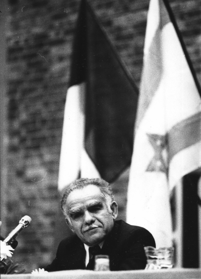 Yitzhak Shamir par Claude Truong-Ngoc 1977.